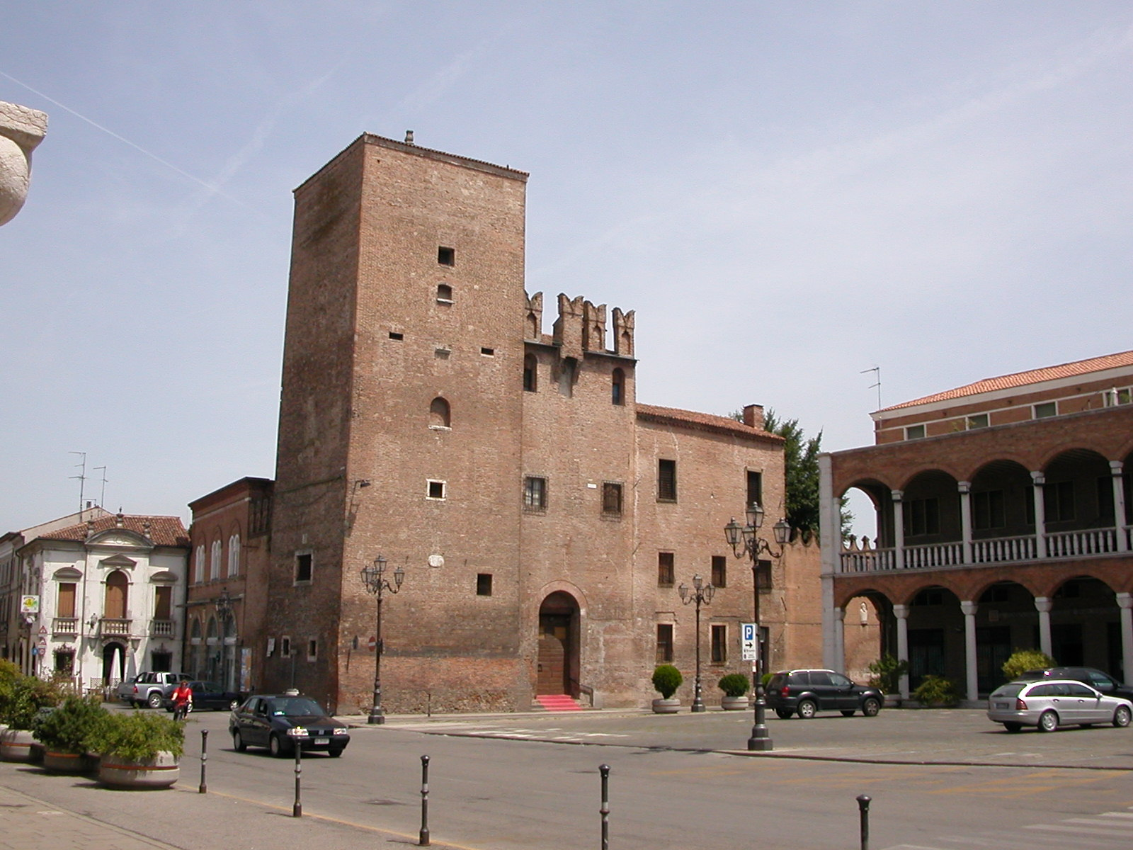 Palazzo pretorio e torre maistra, Lendinara, provincia di Rovigo.